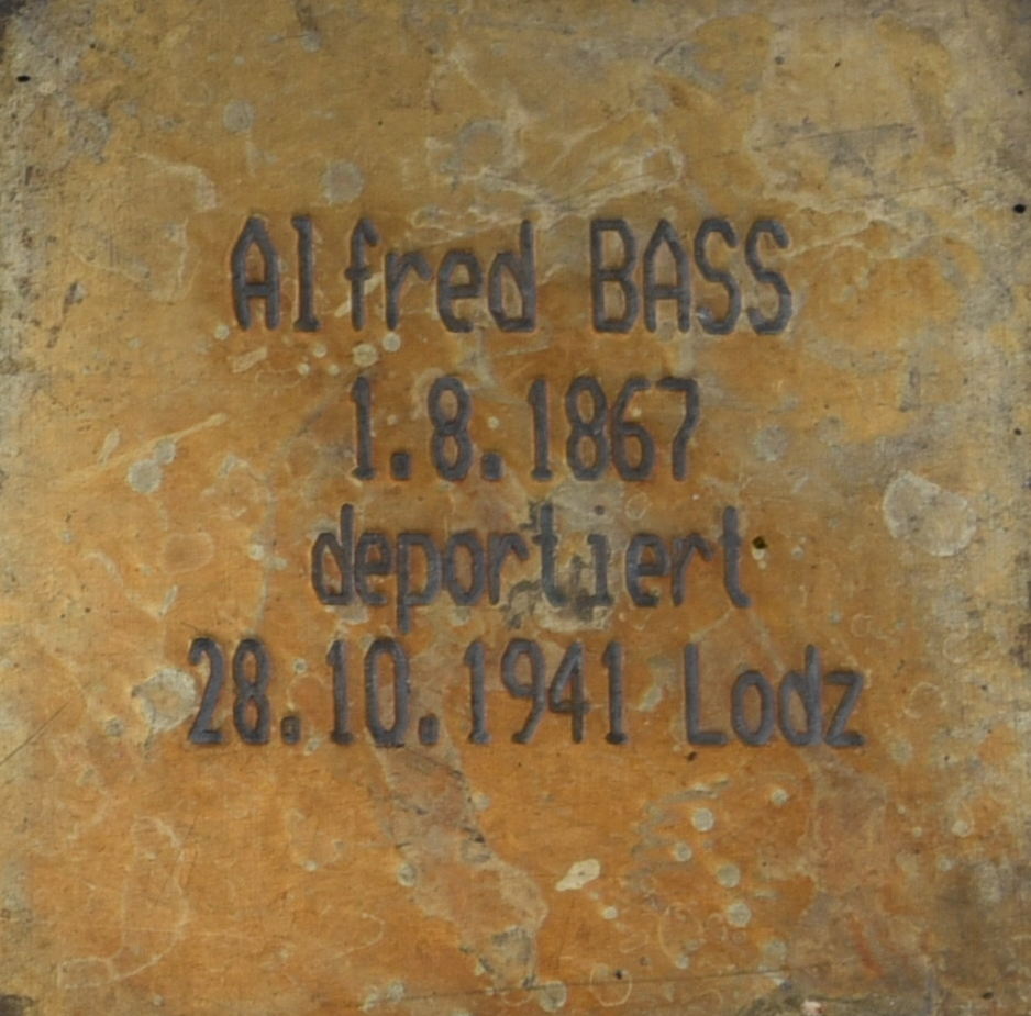 Gedenkstein für Alfred Bass